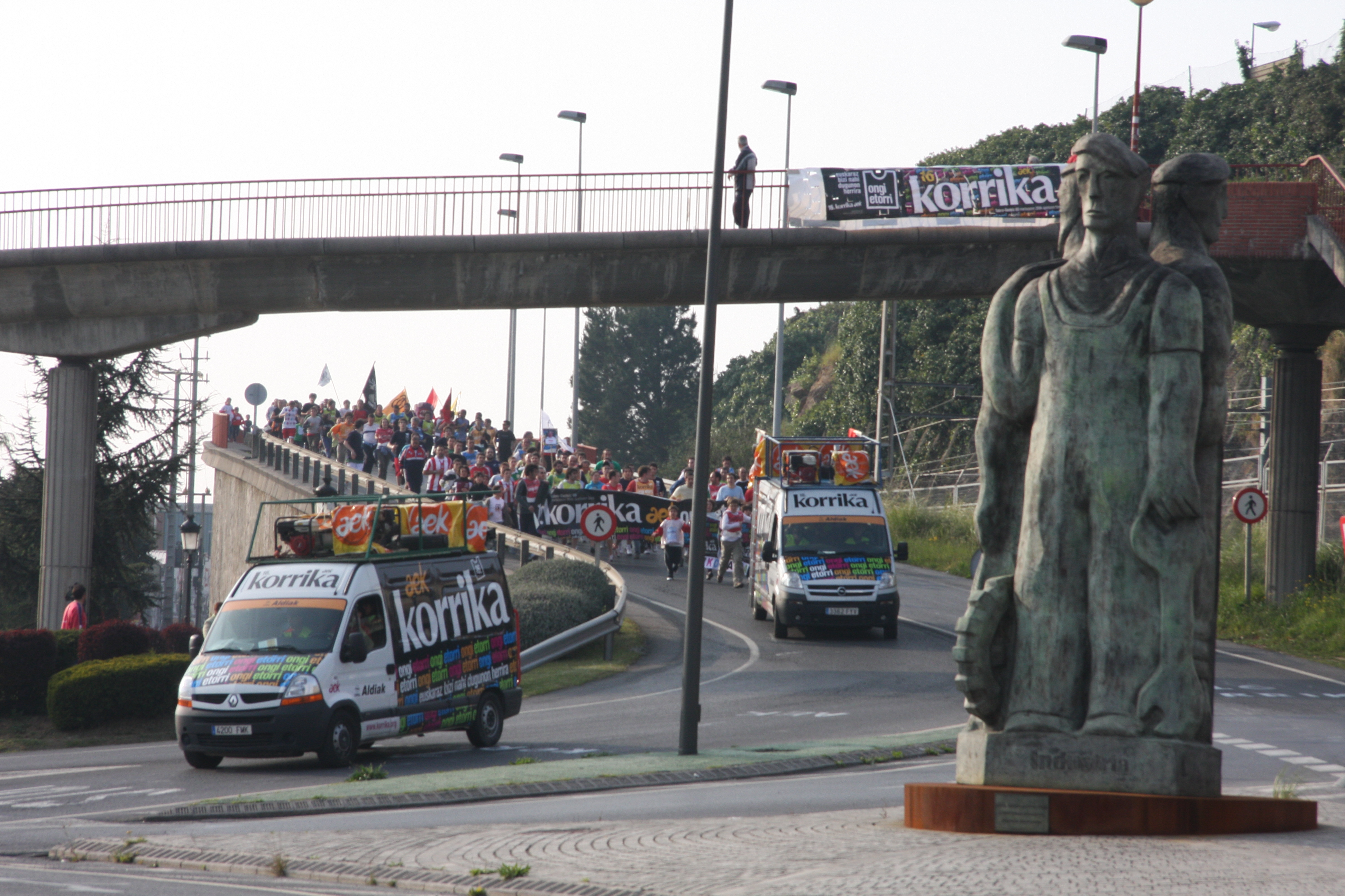 16ª edición de la Korrika (3 de abril de 2009)